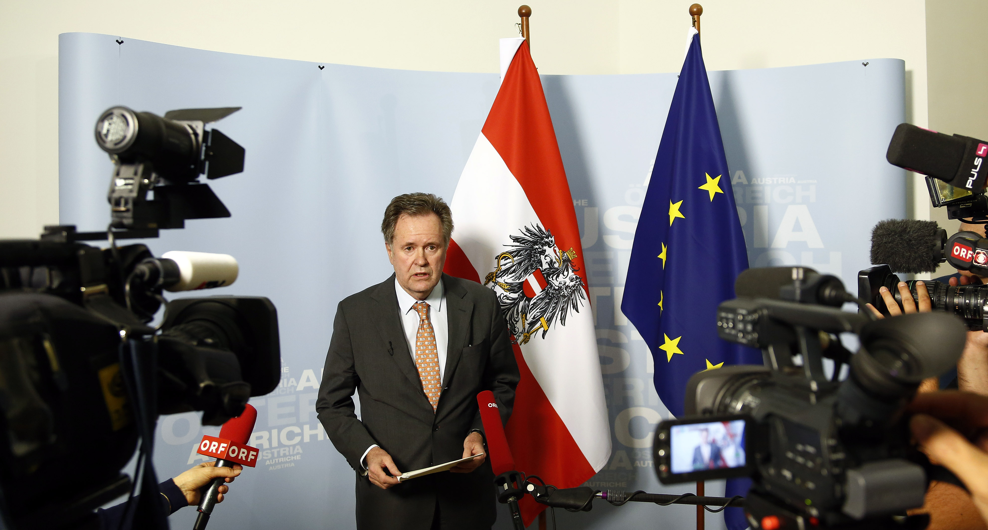 Statement von Generalsekretär Johannes Kyrle zur Befreiung des im Jemen entführten Österreichers Dominik N. und zwei weiteren Geiseln aus Finnland. Aussenministerium, Wien, 09.05.2013, Foto: Dragan Tatic